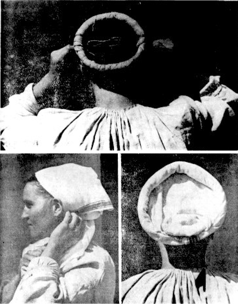 Împletirea părului pe „coarne” – kontykarika (cerc din lemn) și acoperirea lui cu un batic.